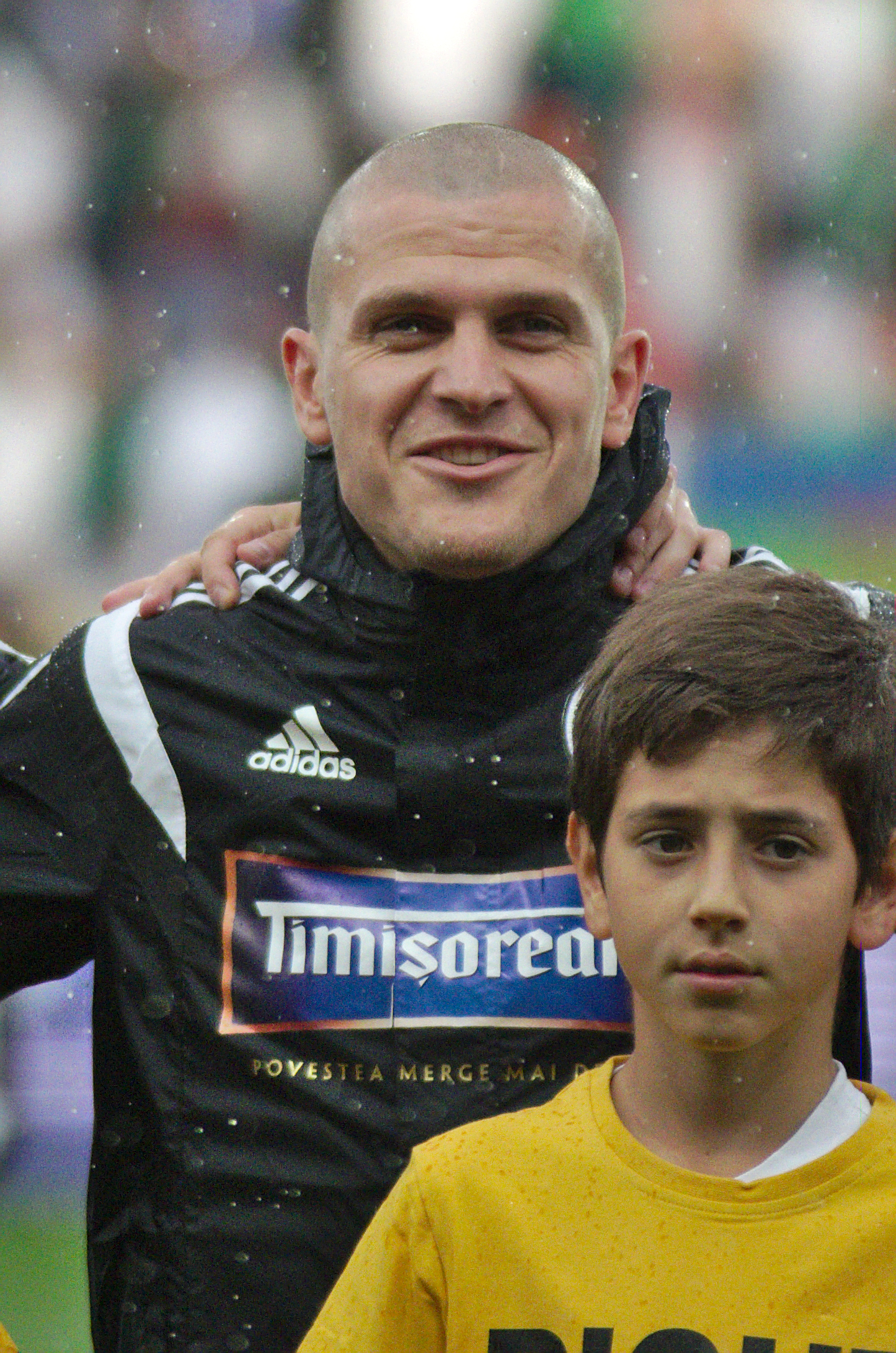 Algérie-Roumanie - 20140604 - Alexandru Bourceanu